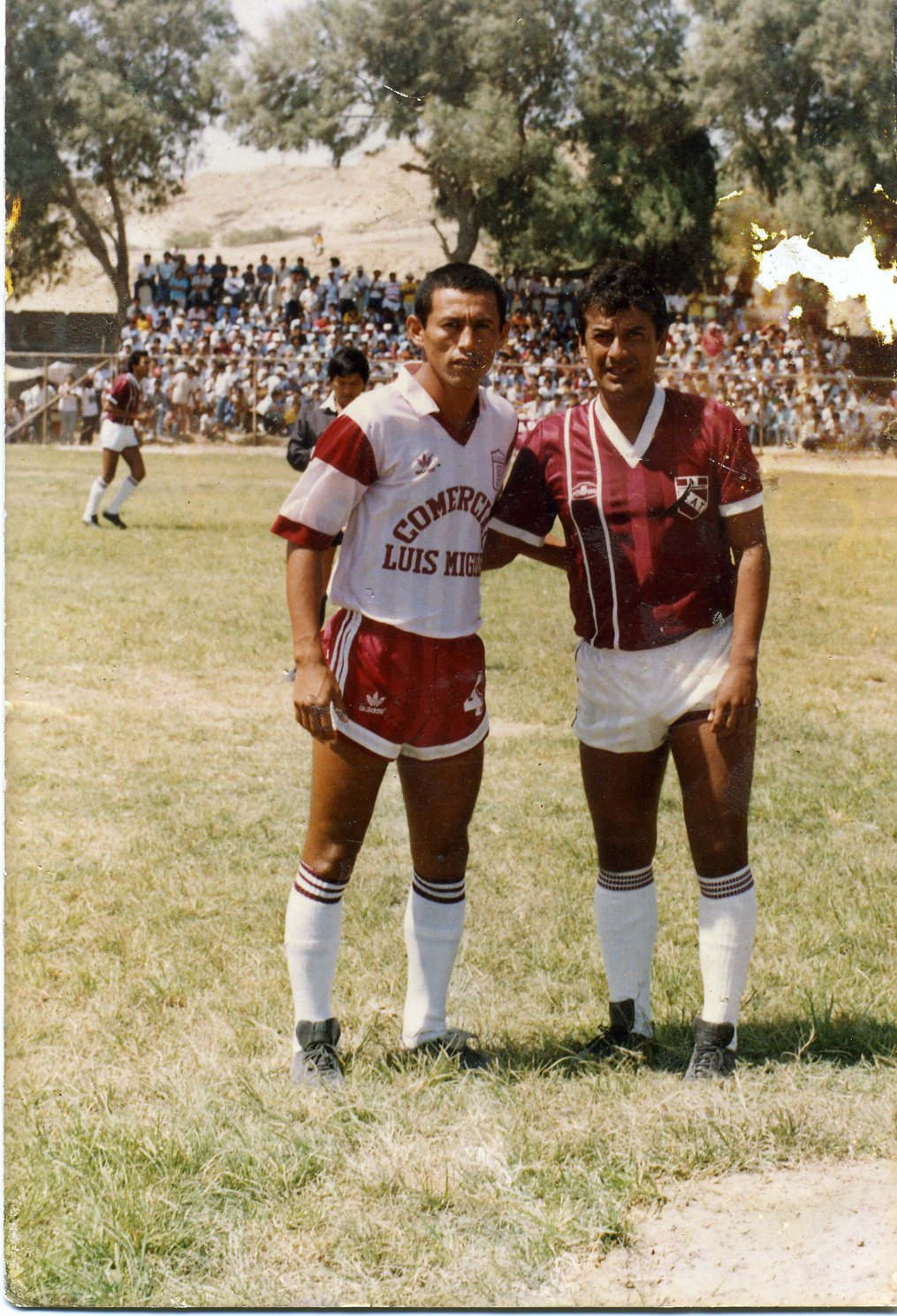 Dos grandes jugadores y capitanes.